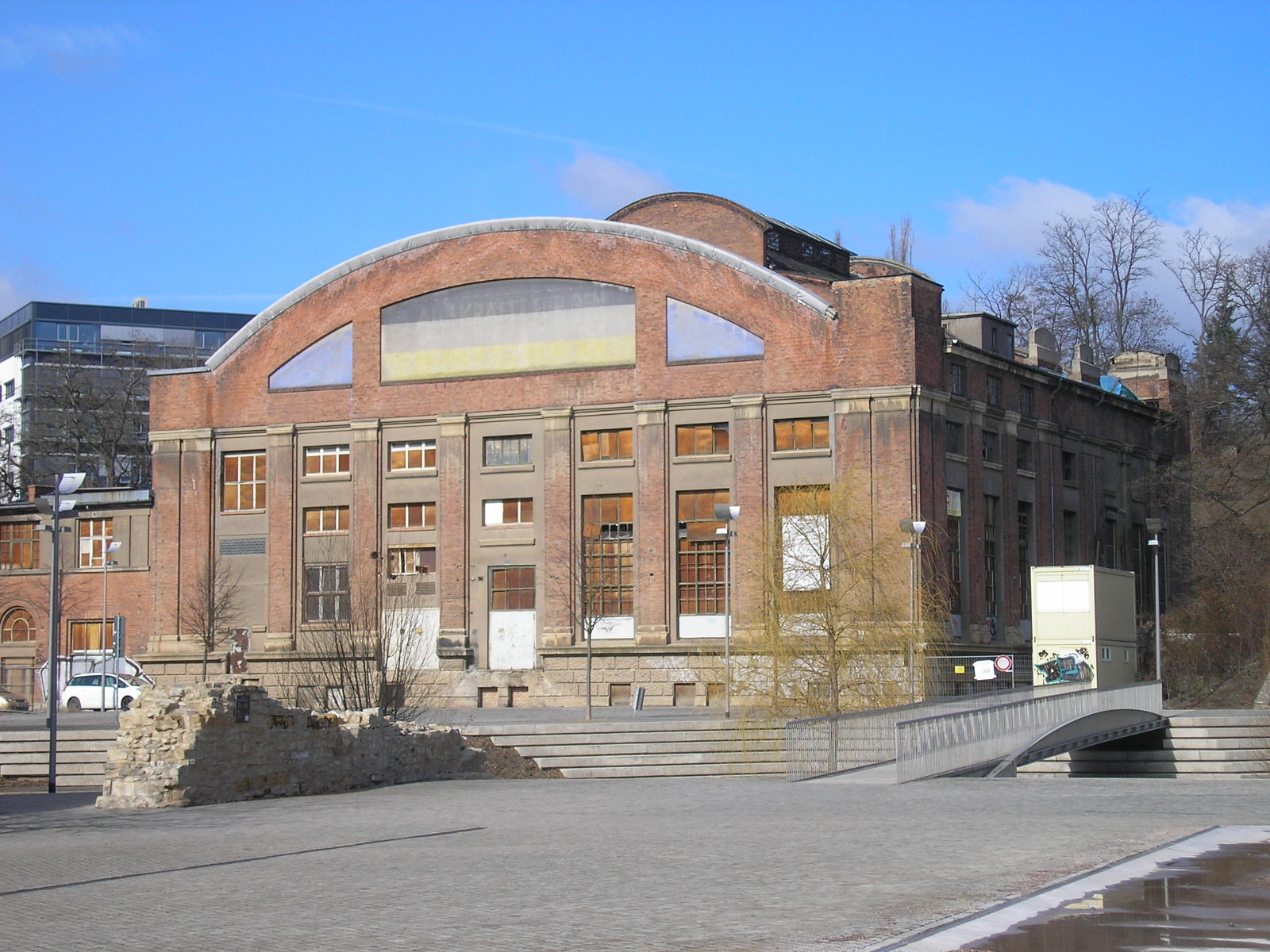 Das ehemalige Heizwerk im Brühl - Maximilian-Welsch-Straße, Erfurt, Thüringen, Deutschland.